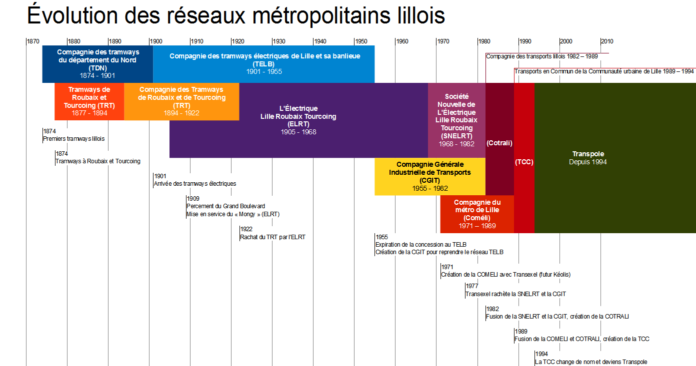 Evolutions des réseaux métropolitains lillois entre 1874 et 2014